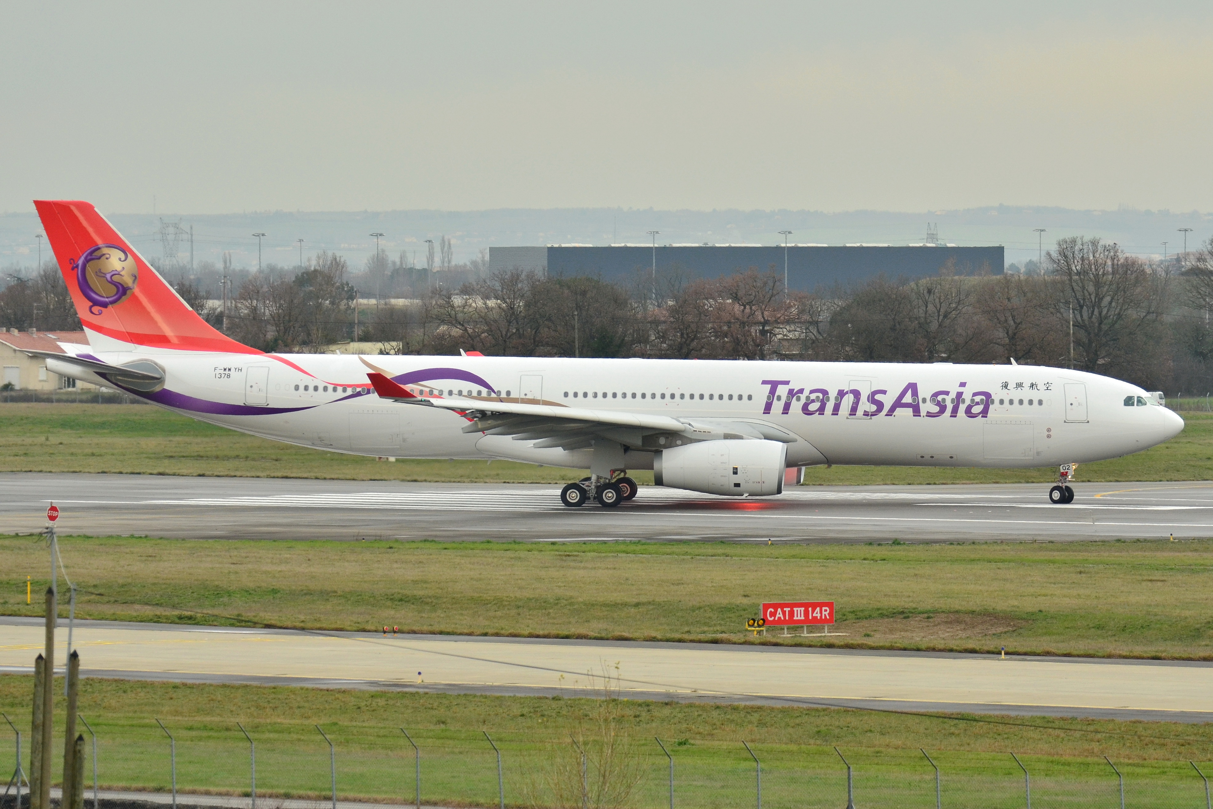 Photo prise à l'aéroport de Toulouse-Blagnac (LFBO) en France. Picture take at Toulouse-Blagnac Airport (LFBO) in France.